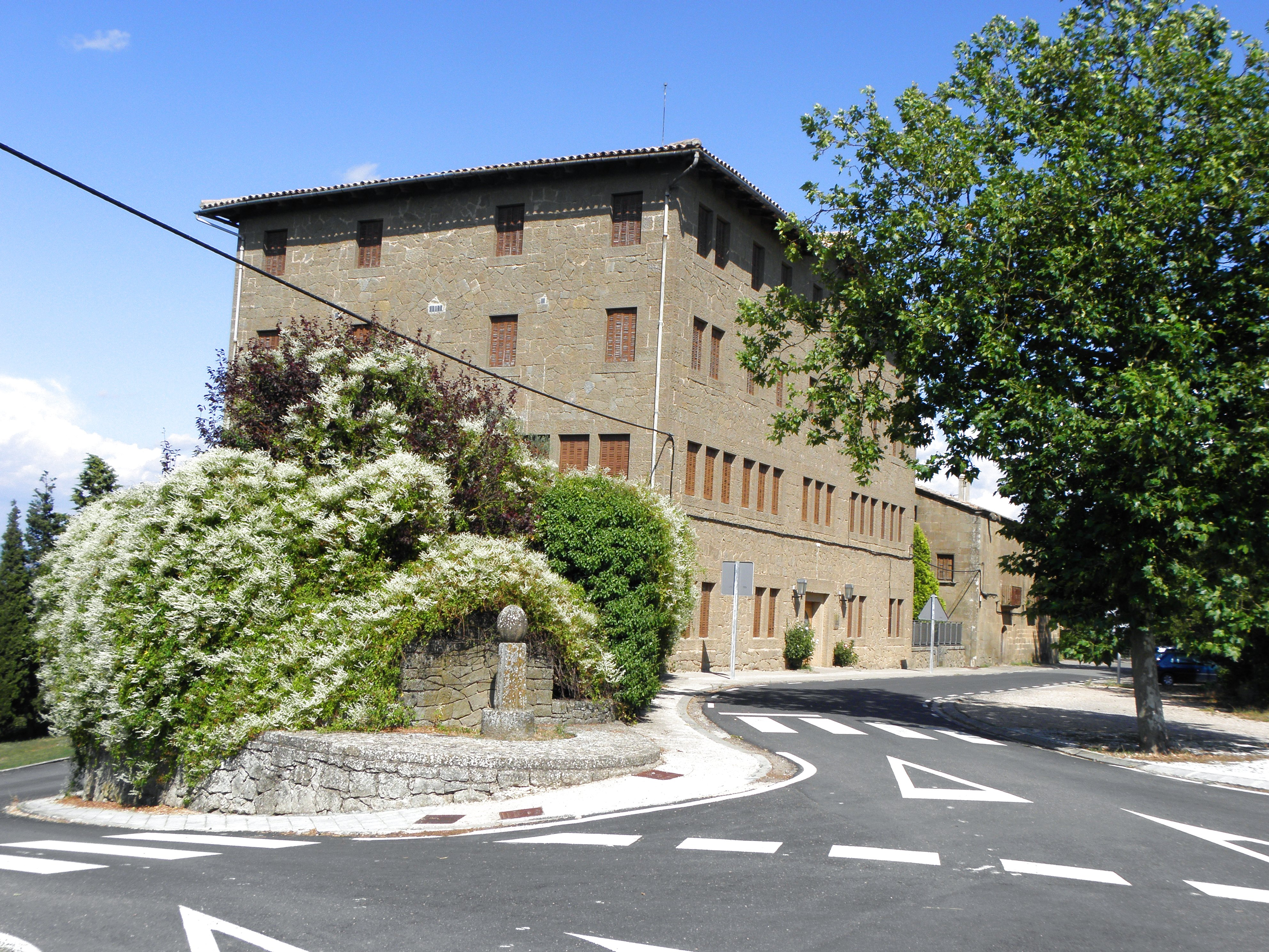 La façana principal (nord) i la de ponent de la Casa d'espiritualitat del Santuari d'El Miracle (Riner, Solsonès)